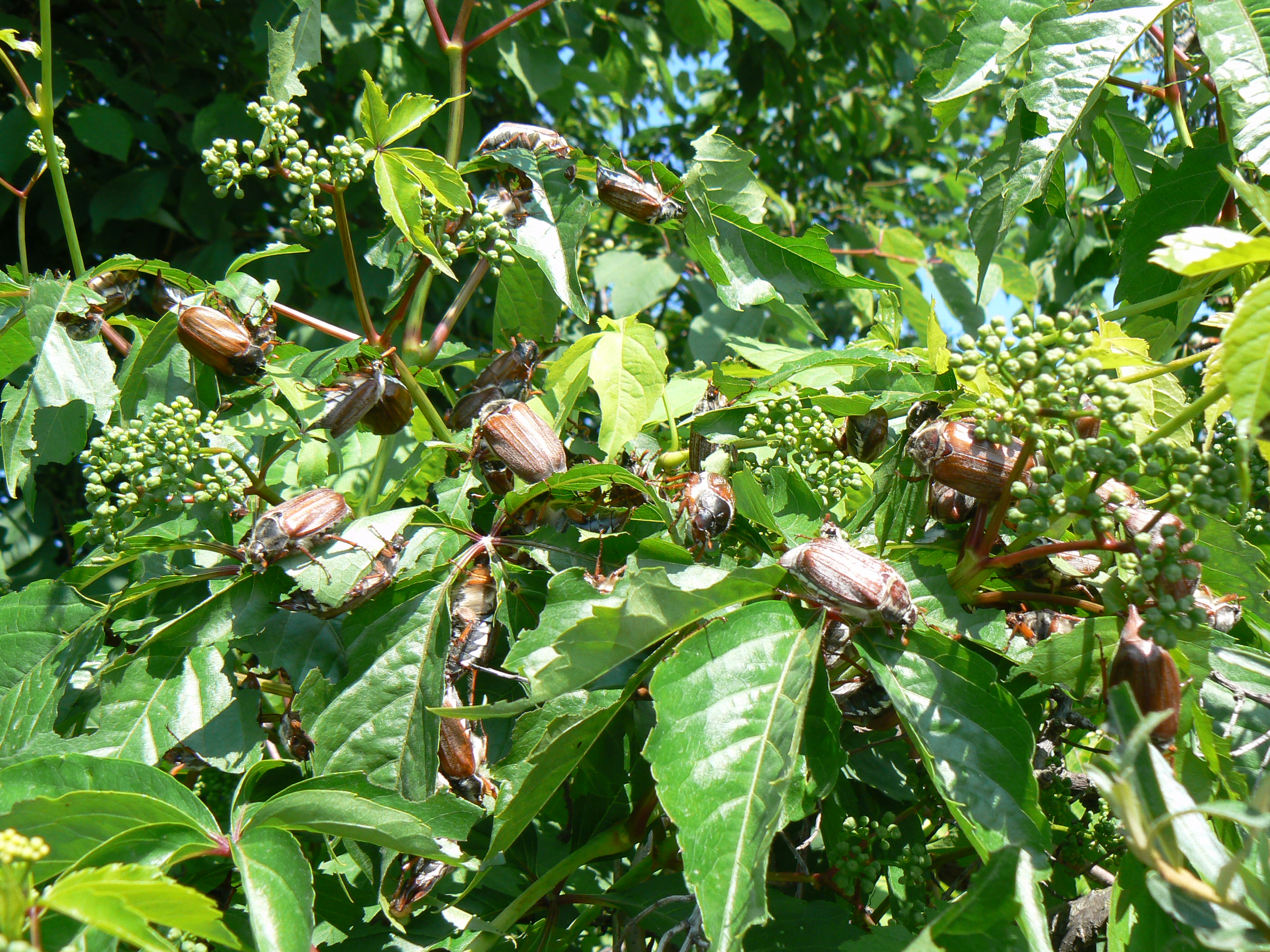 Chrousti (Melolontha melolontha) na psím víně (Parthenocissus quinquefolia) na břehu Baltského moře v Klaipėdě v Melnragė.